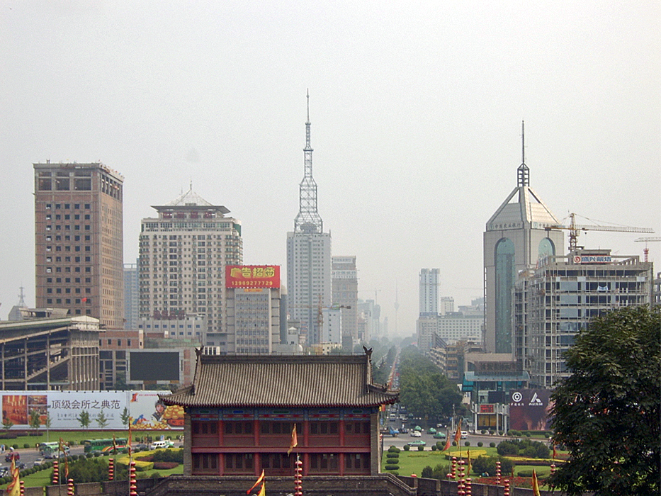 Zentrum von Xi'an (2004)